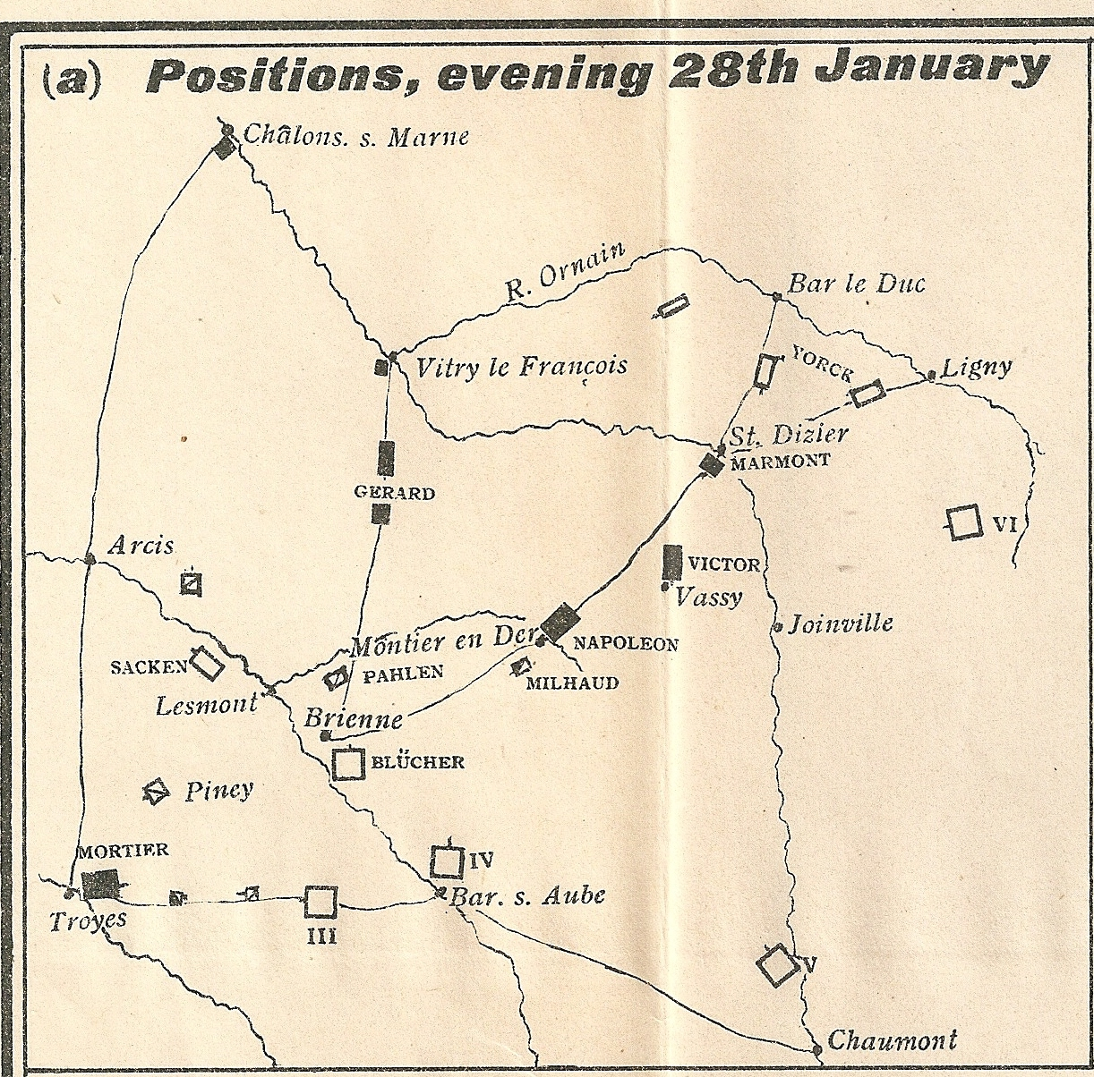 Stellungen der Koalitionstruppen und der Napoleonischen Armee am Abend des 28. Januar 1814